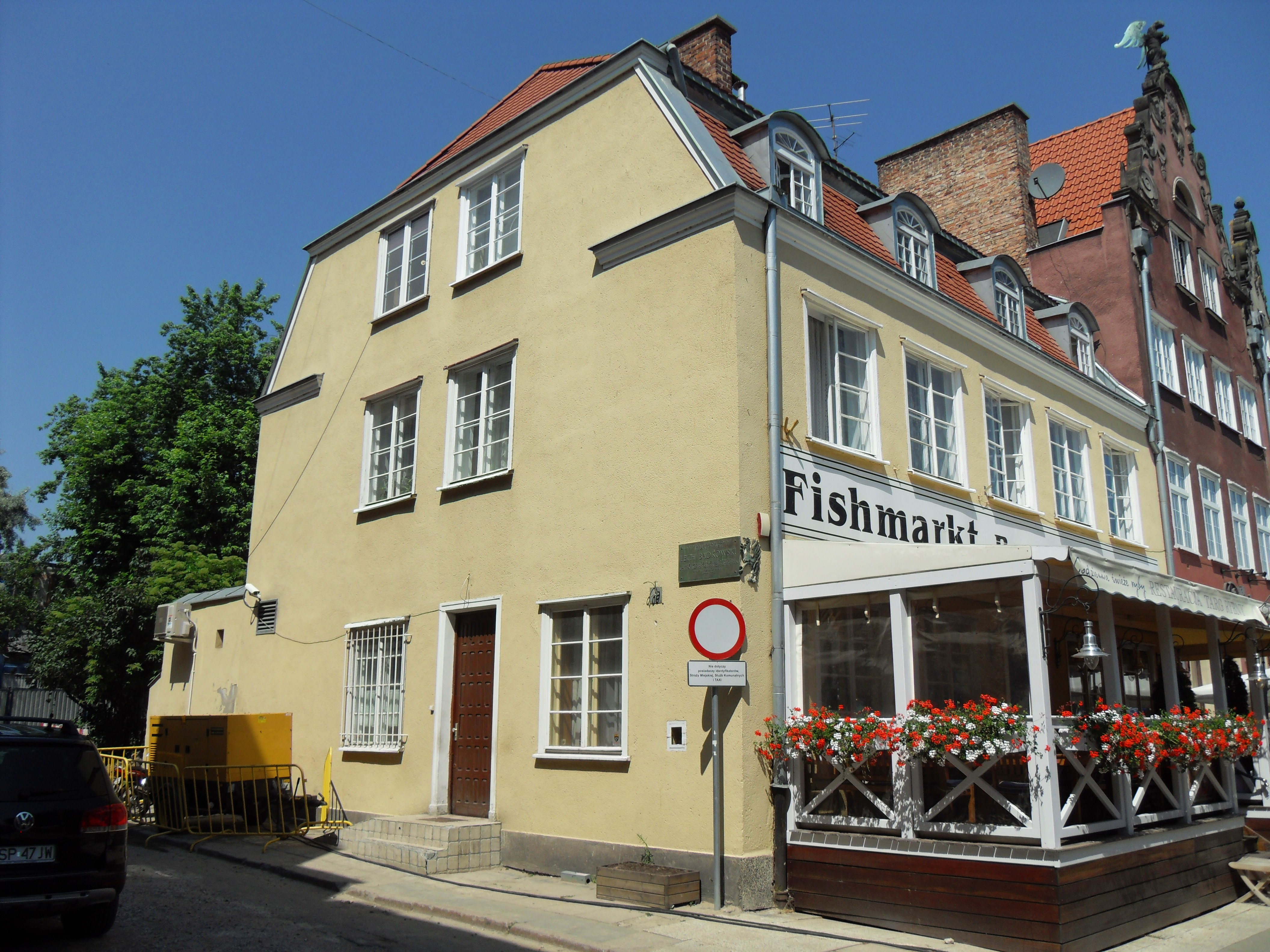 Gdańsk, Targ Rybny 6.